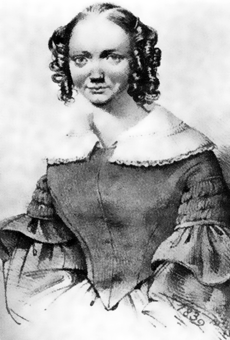 Gravure : portrait de Suzanne Voilquin daté 1839